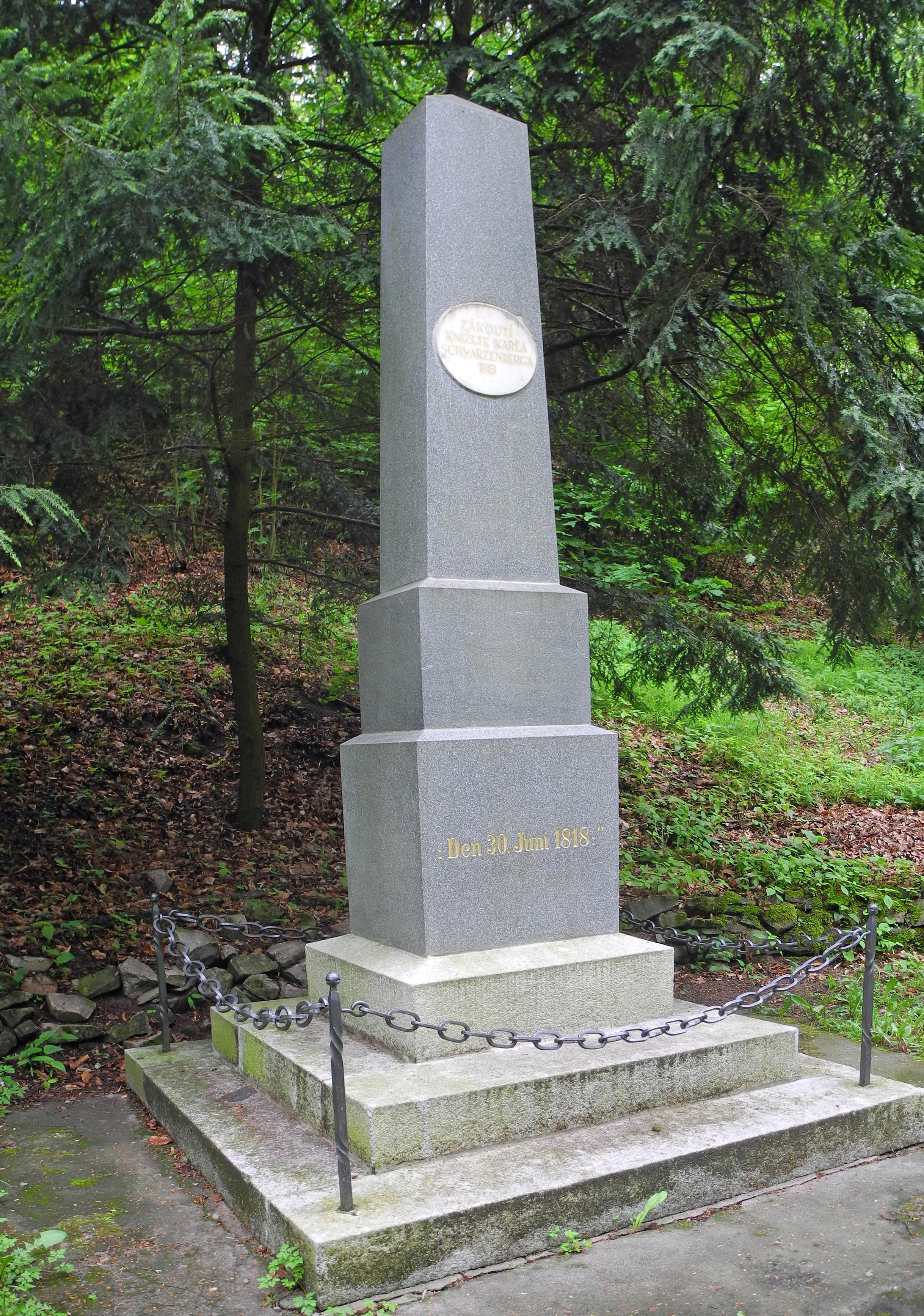 Schwarzenberg-Obelisk in Karlsbad